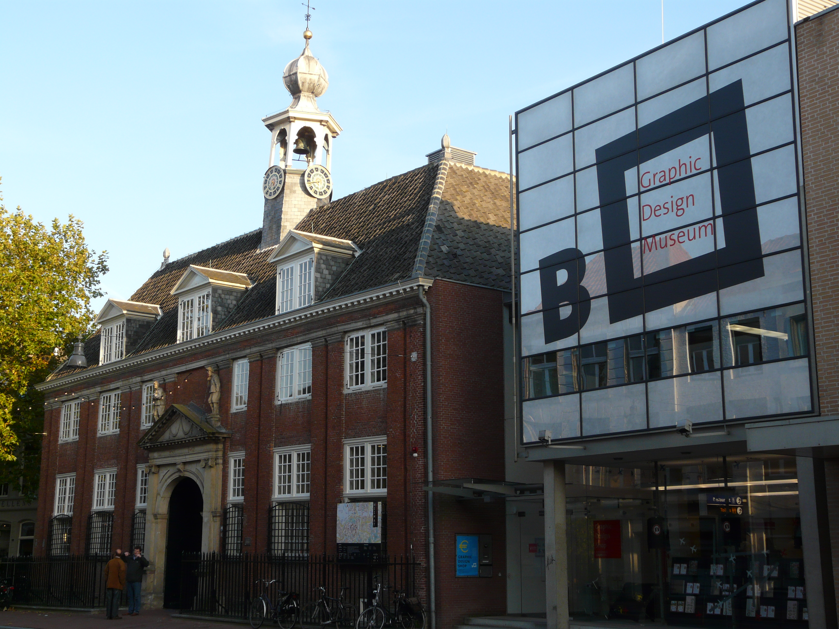 Zicht op deel van de voorzijde van het voormalige museum het Graphic Design Museum, sinds voorjaar 2017 Stedelijk Museum Breda genoemd. Gevestigd in de Boschstraat 22 in het centrum van Breda